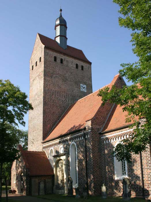 selbst fotografiert